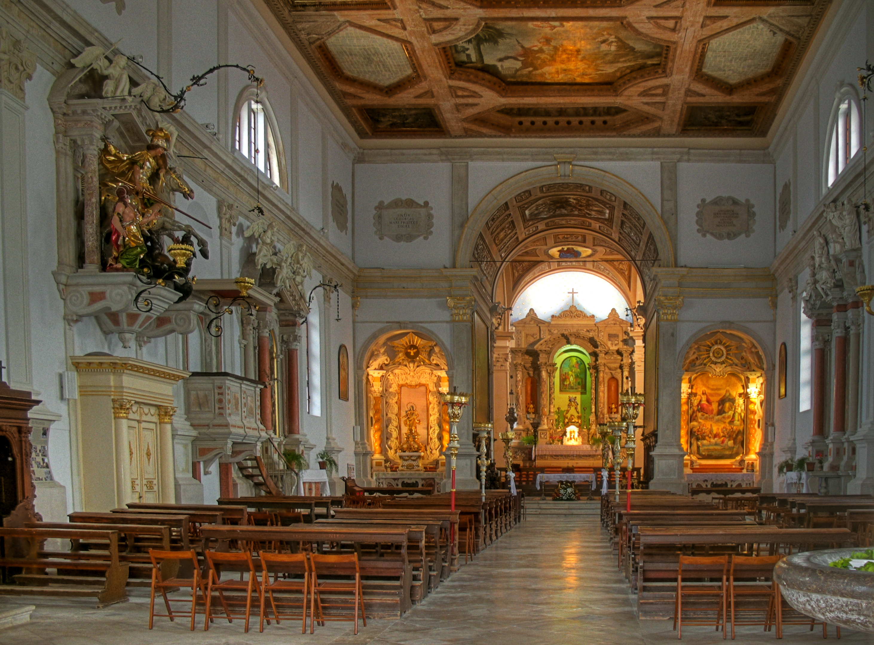 Slowenien, Piran, St. Georg, Innenraum, HDR-Aufnahme